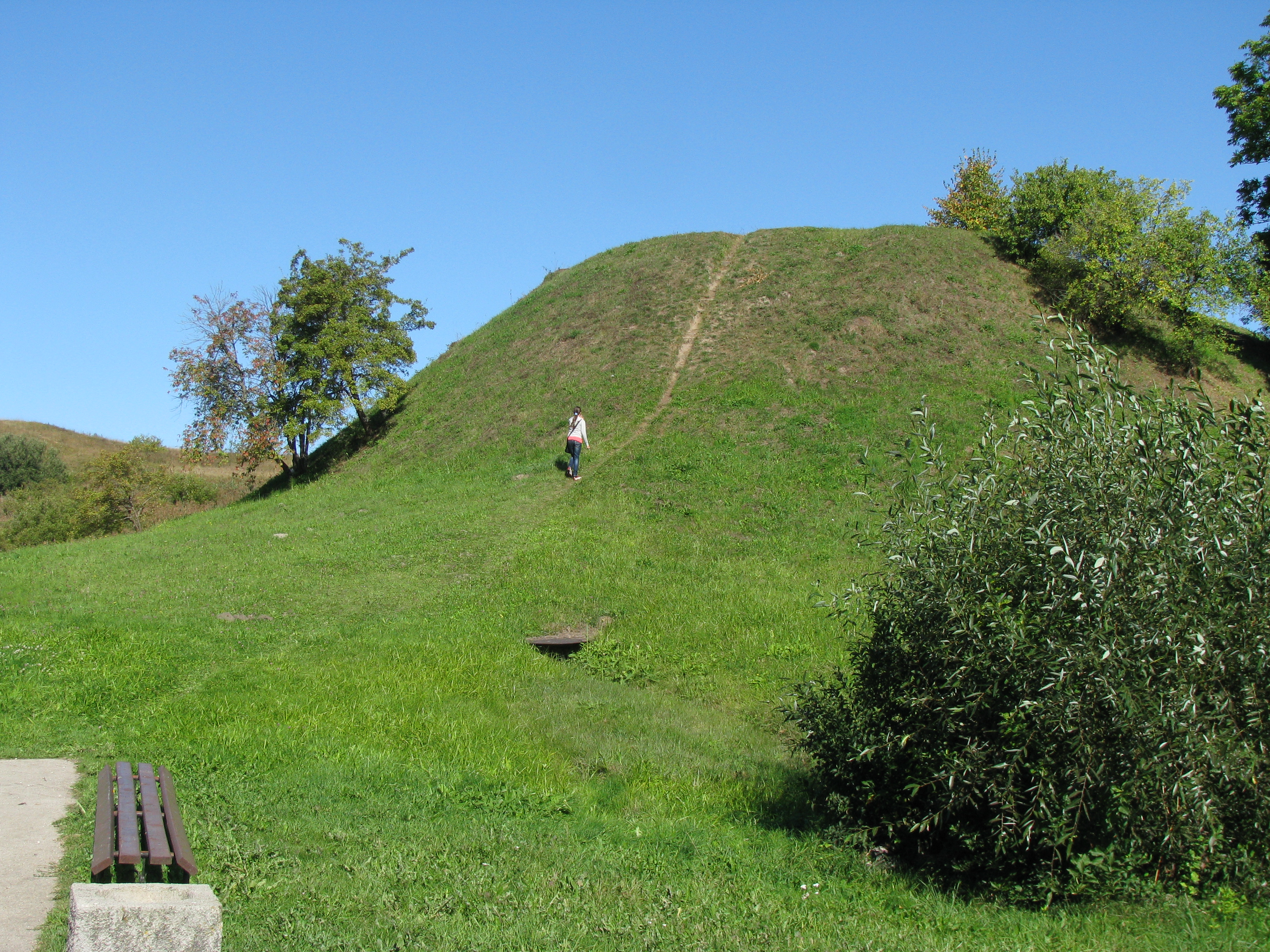 Kandava_2013